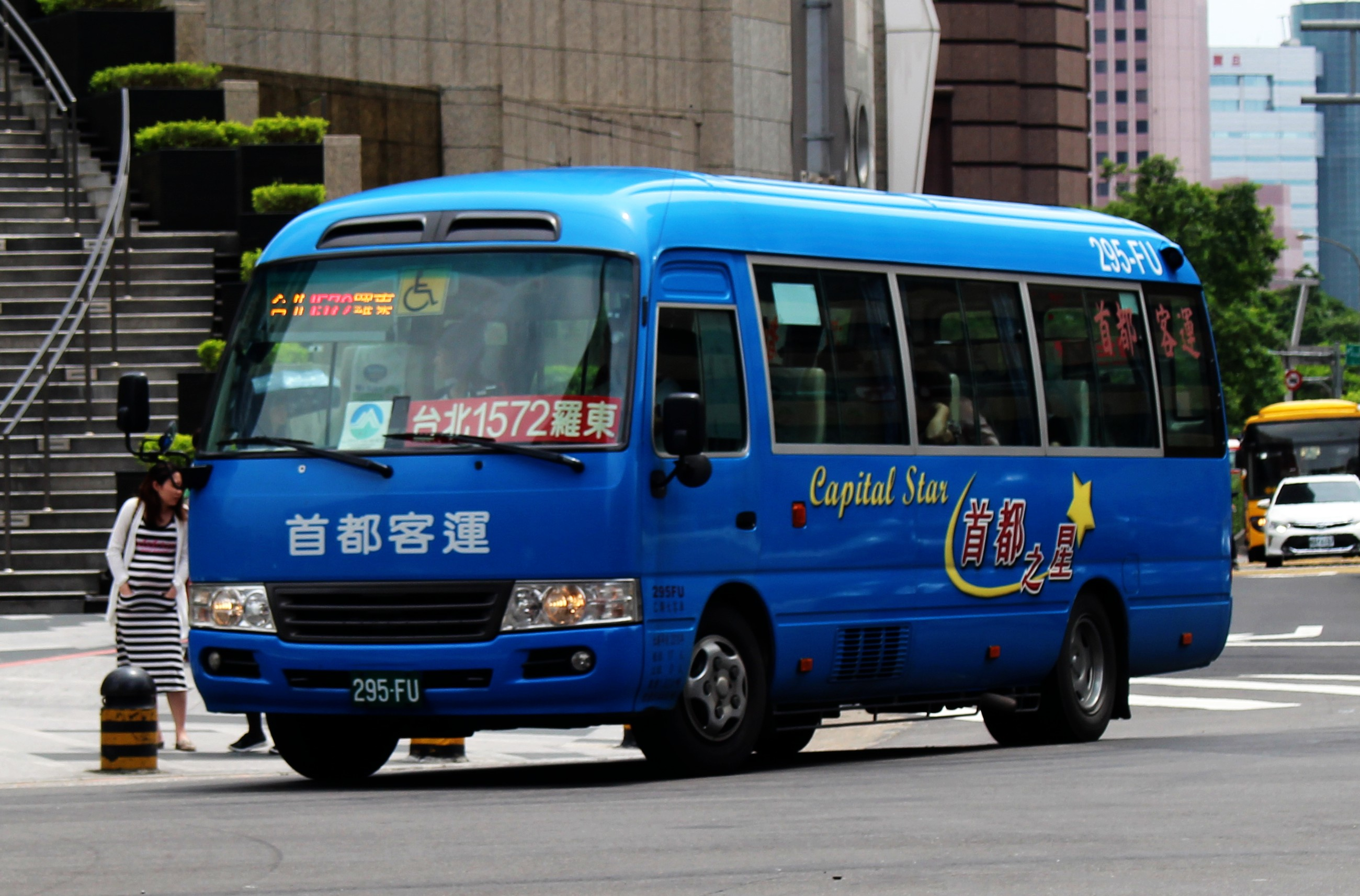 首都客運2010 TOYOTA COASTER XZB50L-ZEMSYR 295-FU 復康巴士